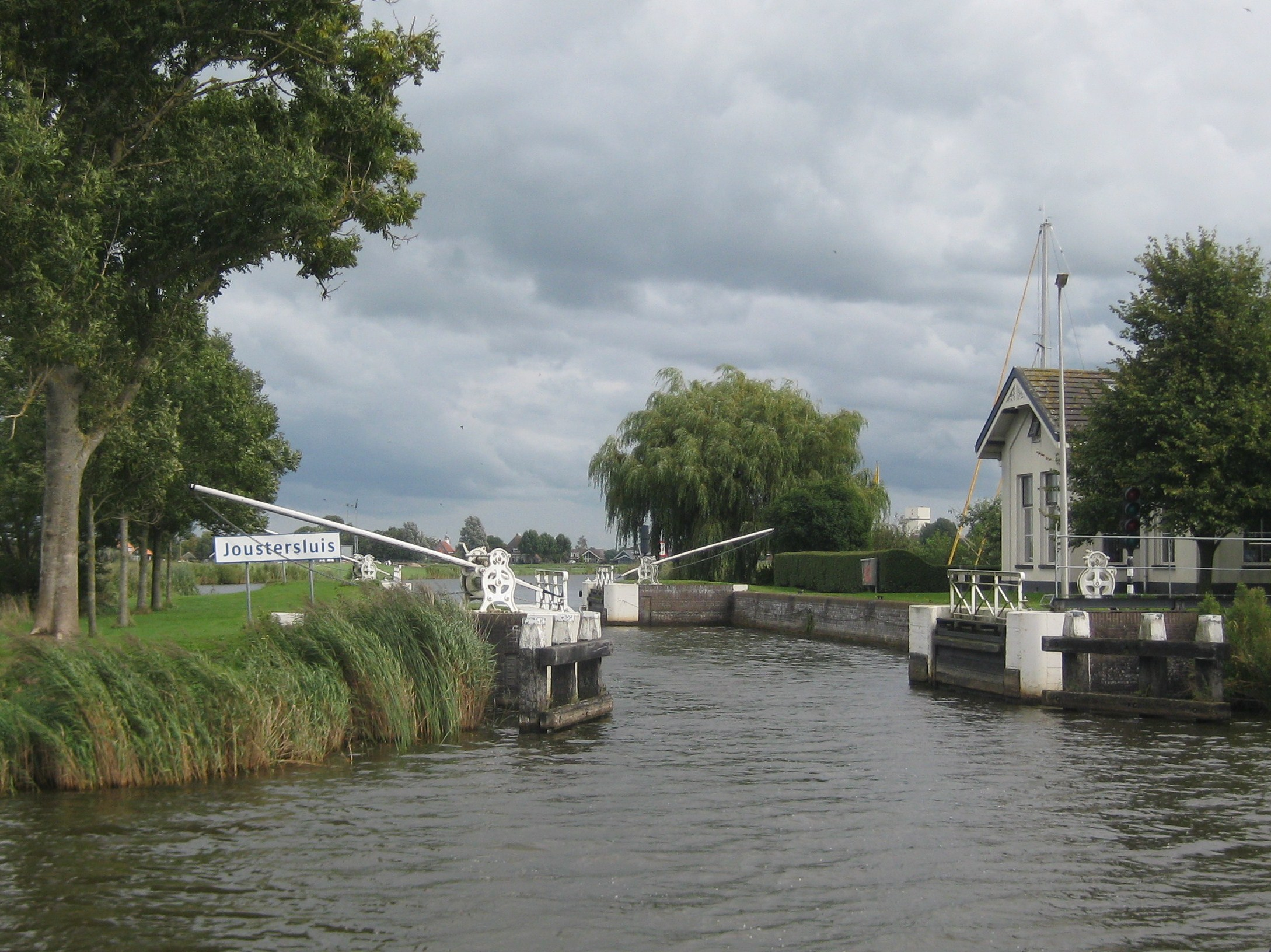 Joustersluis bij Joure, Friesland